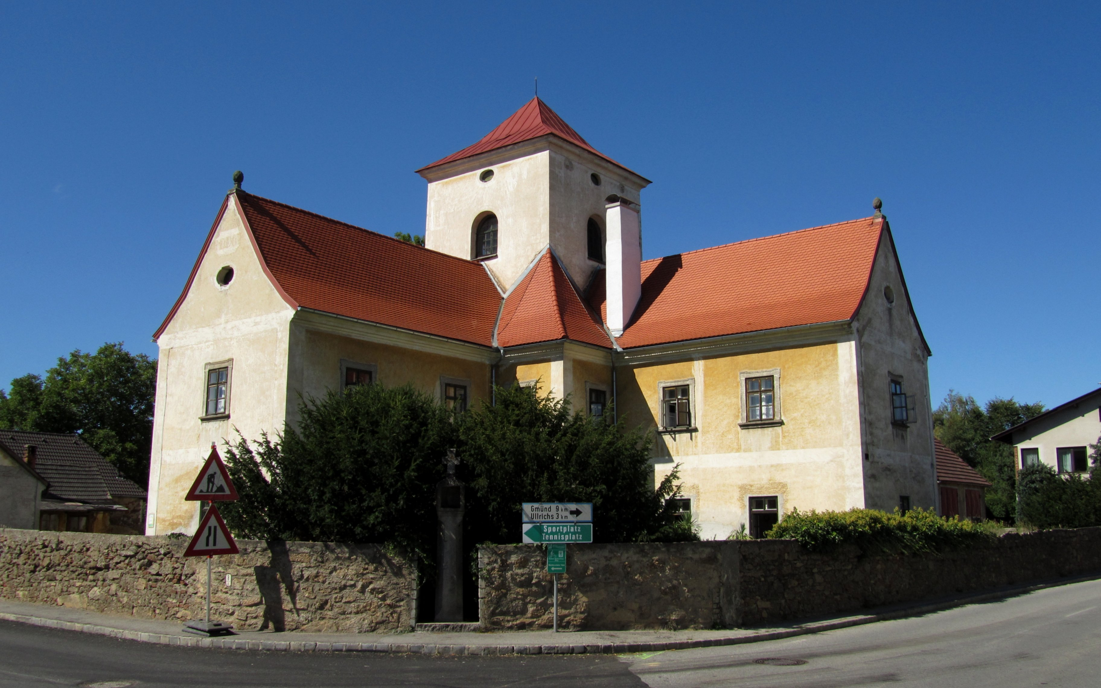 Ehem. Allerheiligen- Hospital, Bürgerspital